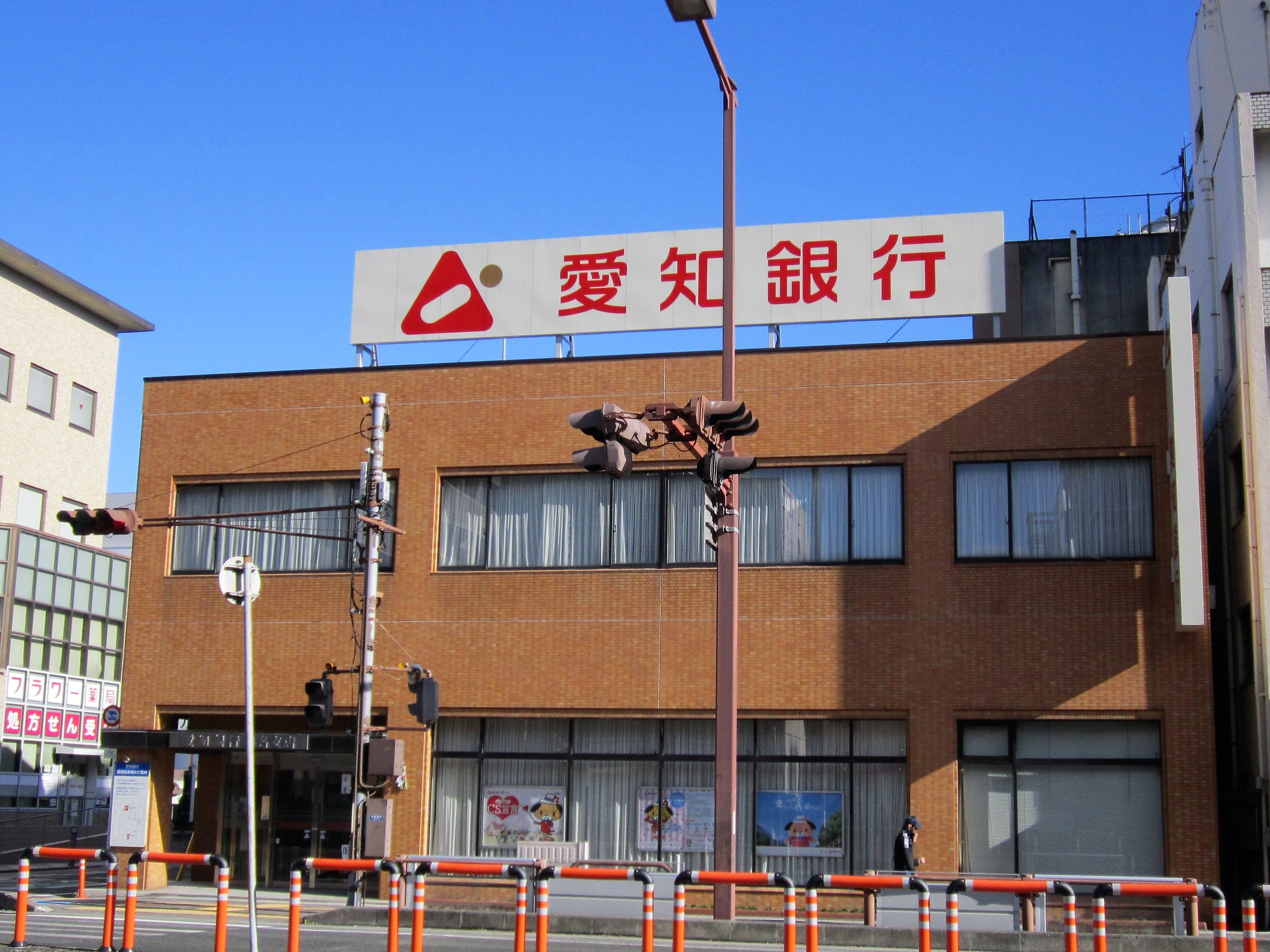 愛知銀行桑名支店（桑名市寿町） Canon PowerShot A2200